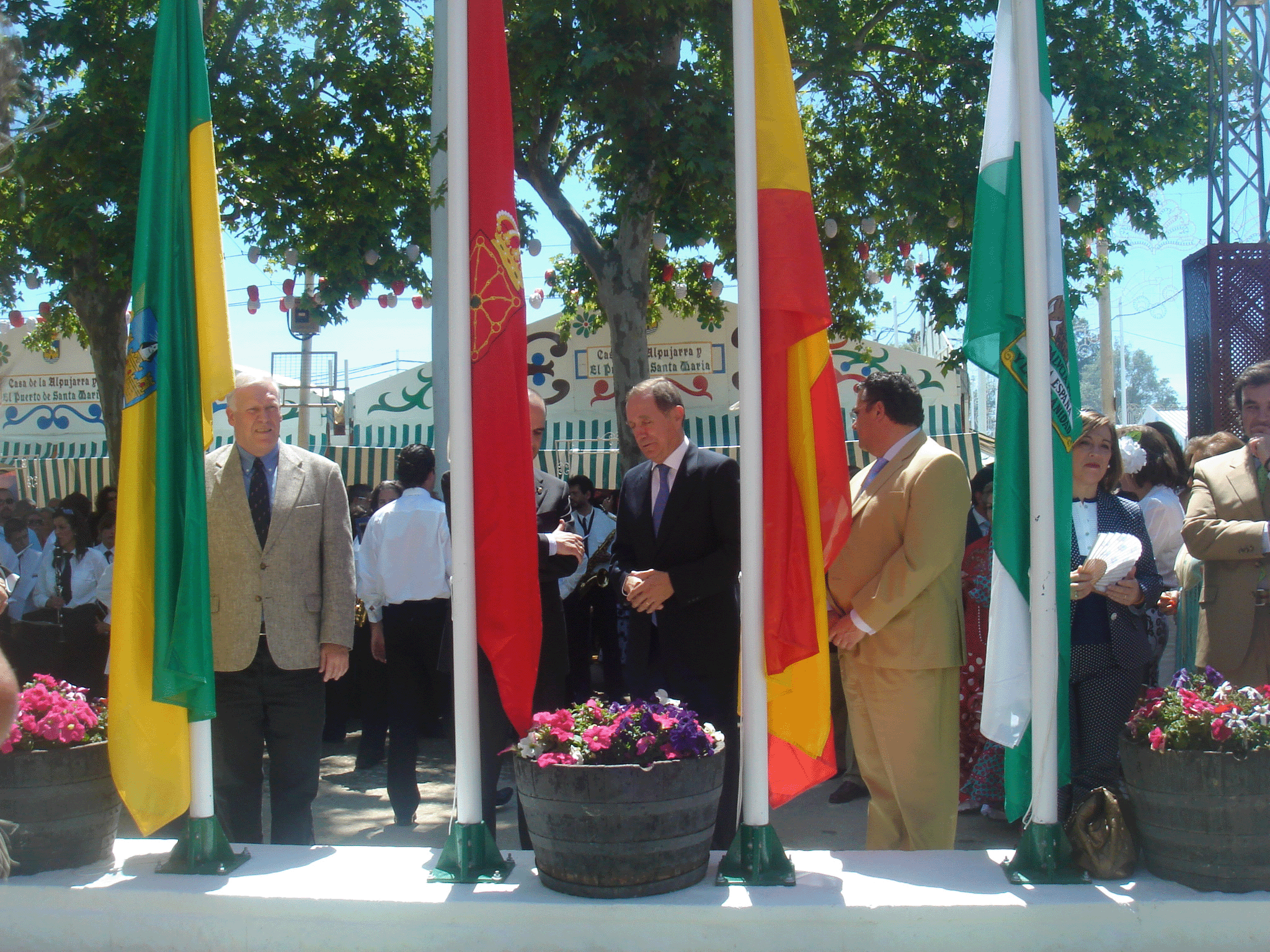 Momento de la izada de banderas el día de la inauguracion de la Feria de 2008, dedicada a Navarra